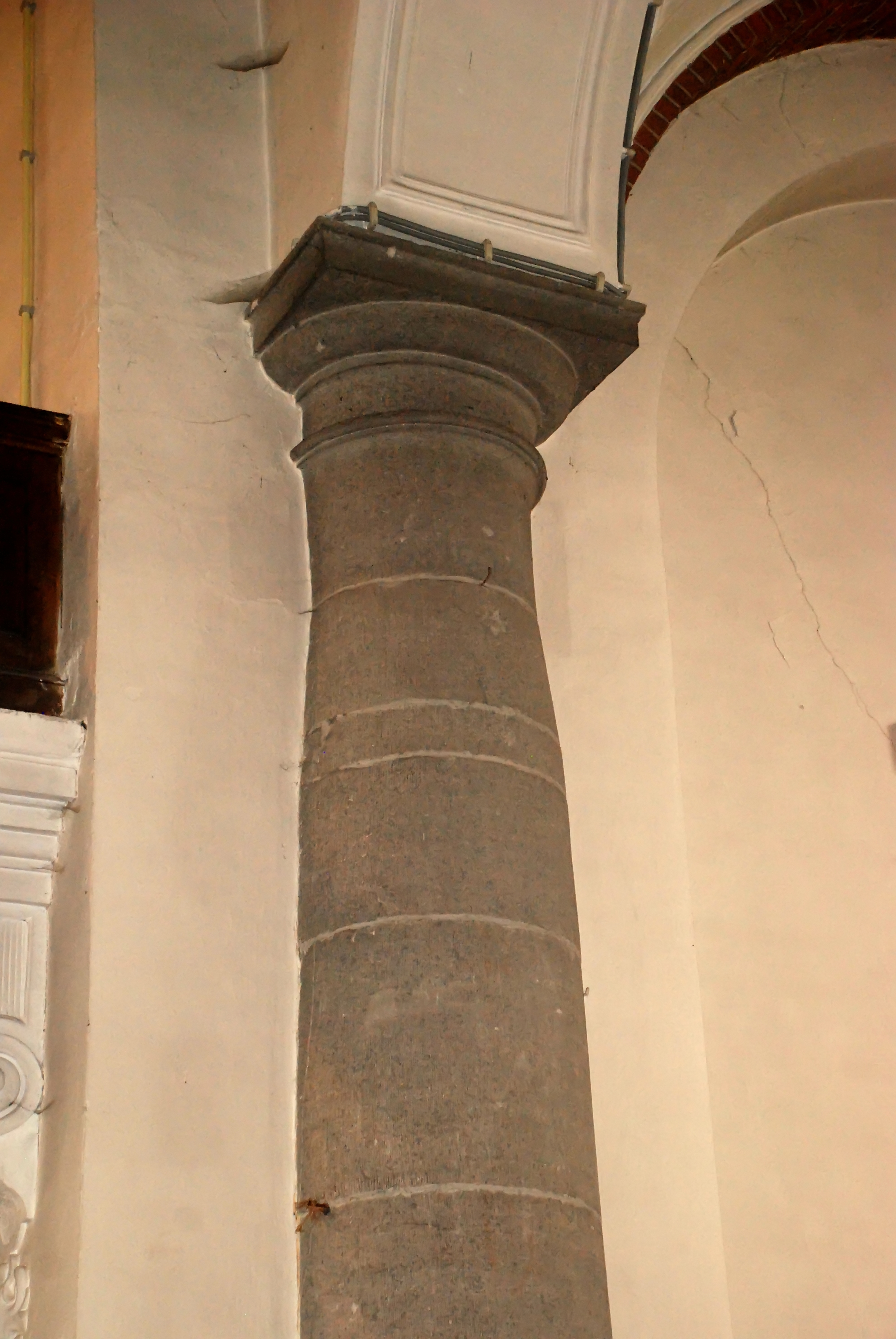 Belgique - Brabant wallon - Genappe - Baisy-Thy - Église Saint-Hubert